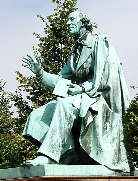 Skulpture of H.C. Andersen in Rosenborg Garden in Copenhagen.